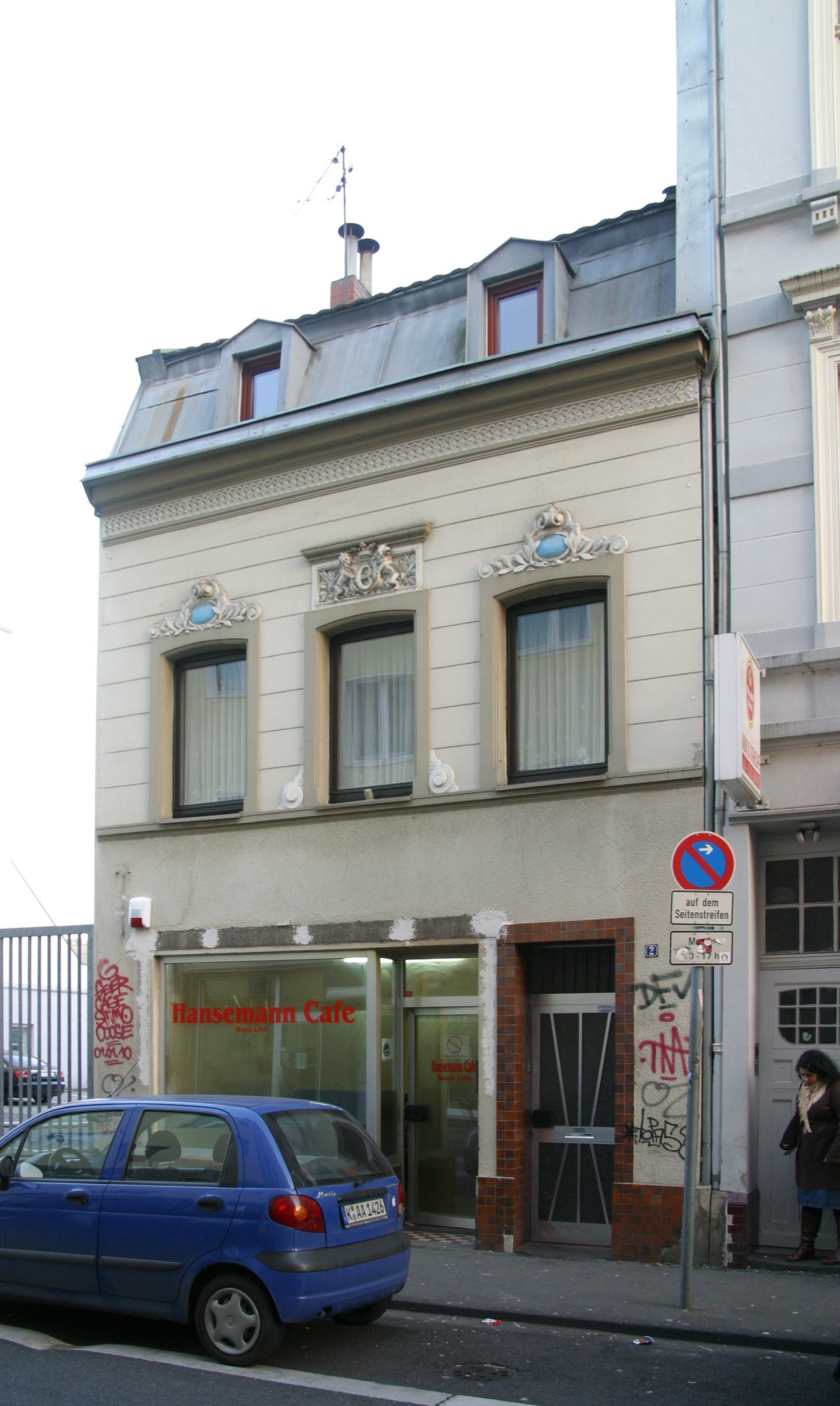 Wohn- und Geschäftshaus Hansemannstrasse 2, Köln EhrenfeldThis is a photograph of an architectural monument.